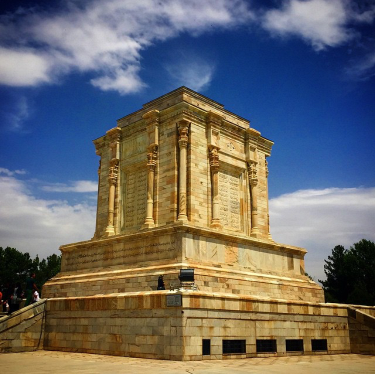 آرامگاه فردوسی